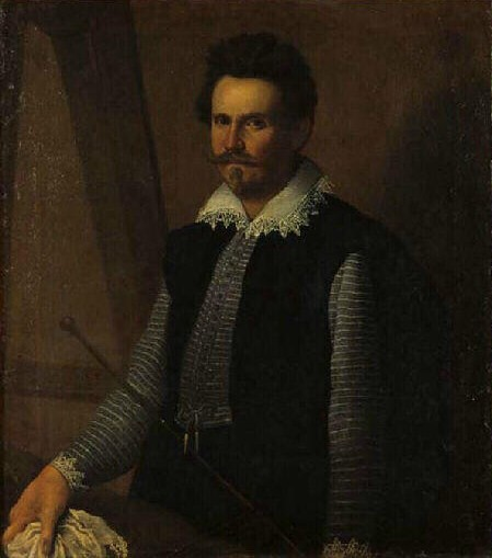 Retrato de un pintor Musée des Beaux-Arts de Chambéry Native nameMusée des beaux-arts de ChambéryLocationChambéry, Savoie, FranceCoordinates45° 34′ 06″ N, 5° 55′ 11″ E WebsiteOfficial websiteAuthority control : Q3330197 VIAF: 136484650 SUDOC: 026393867 BNF: 11864961k Museofile: M1048